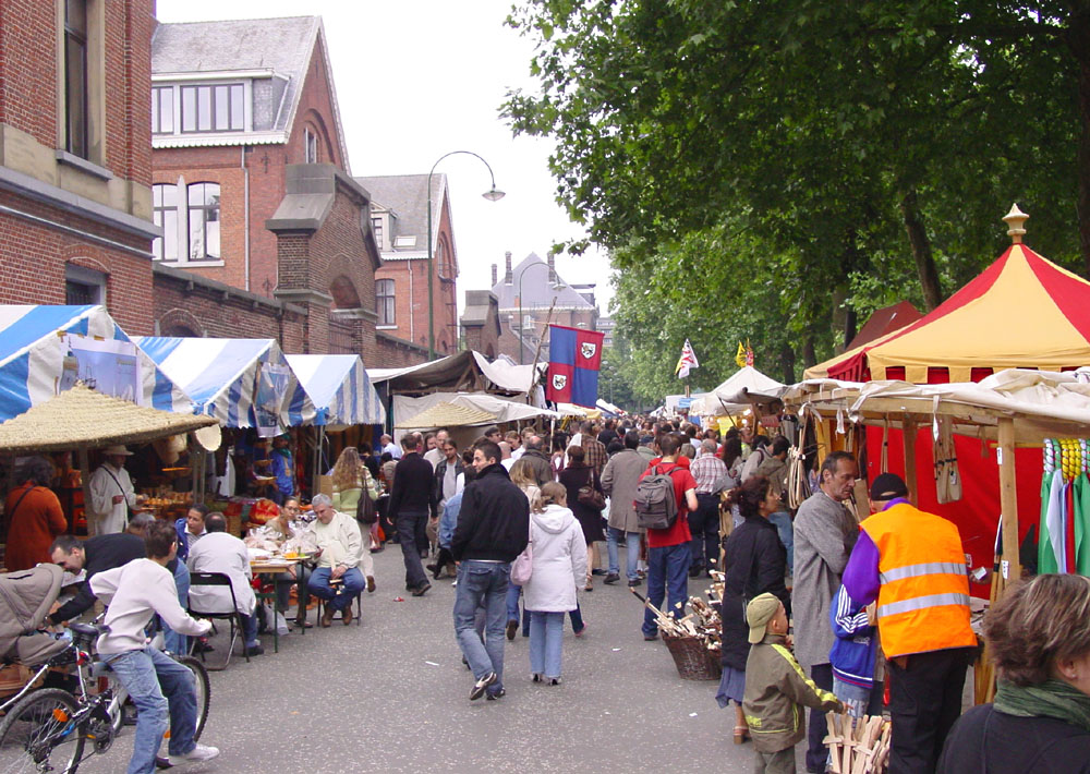 The Etterbeek Medieval Market, 2007